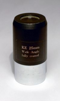 26mm Kellner Eyepiece (Celestron SMA clone) Oculaire Kellner 26 mm (clone de Celestron SMA)